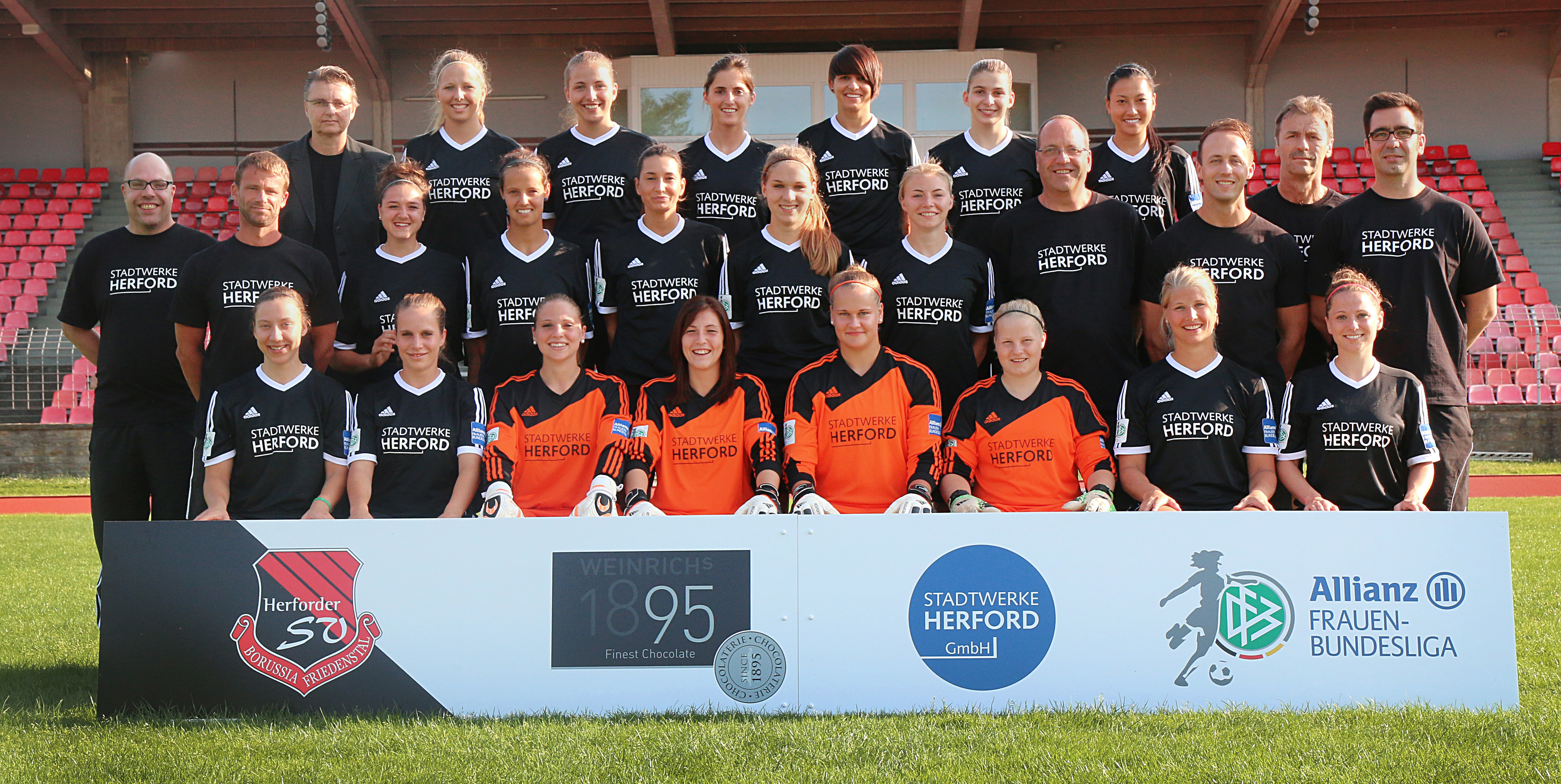 Herforder SV Borussia Friedenstal Team 2014/2015